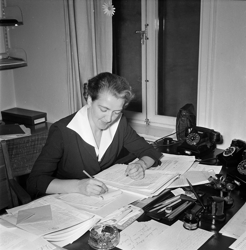 Agda Rössel, ordförande (1948–1952) i Yrkeskvinnors Samarbetsförbund (Y.S.F.). Bilden är tagen på Drottninggatan 31. Fotonummer SvD 25953